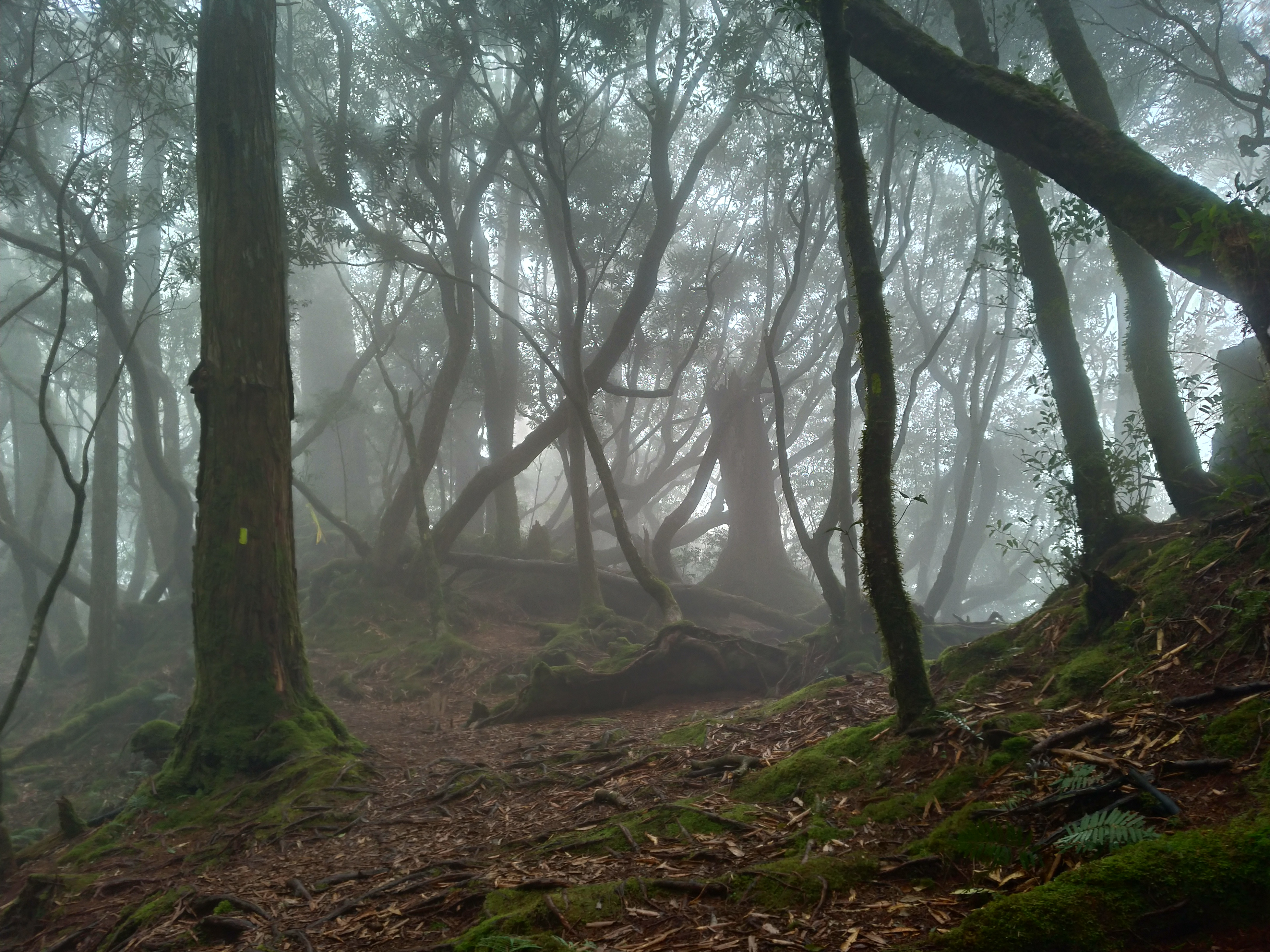 中文（台灣）: 塔(塔曼山)魔(玫瑰西魔山)巴(巴博庫魯山)之景